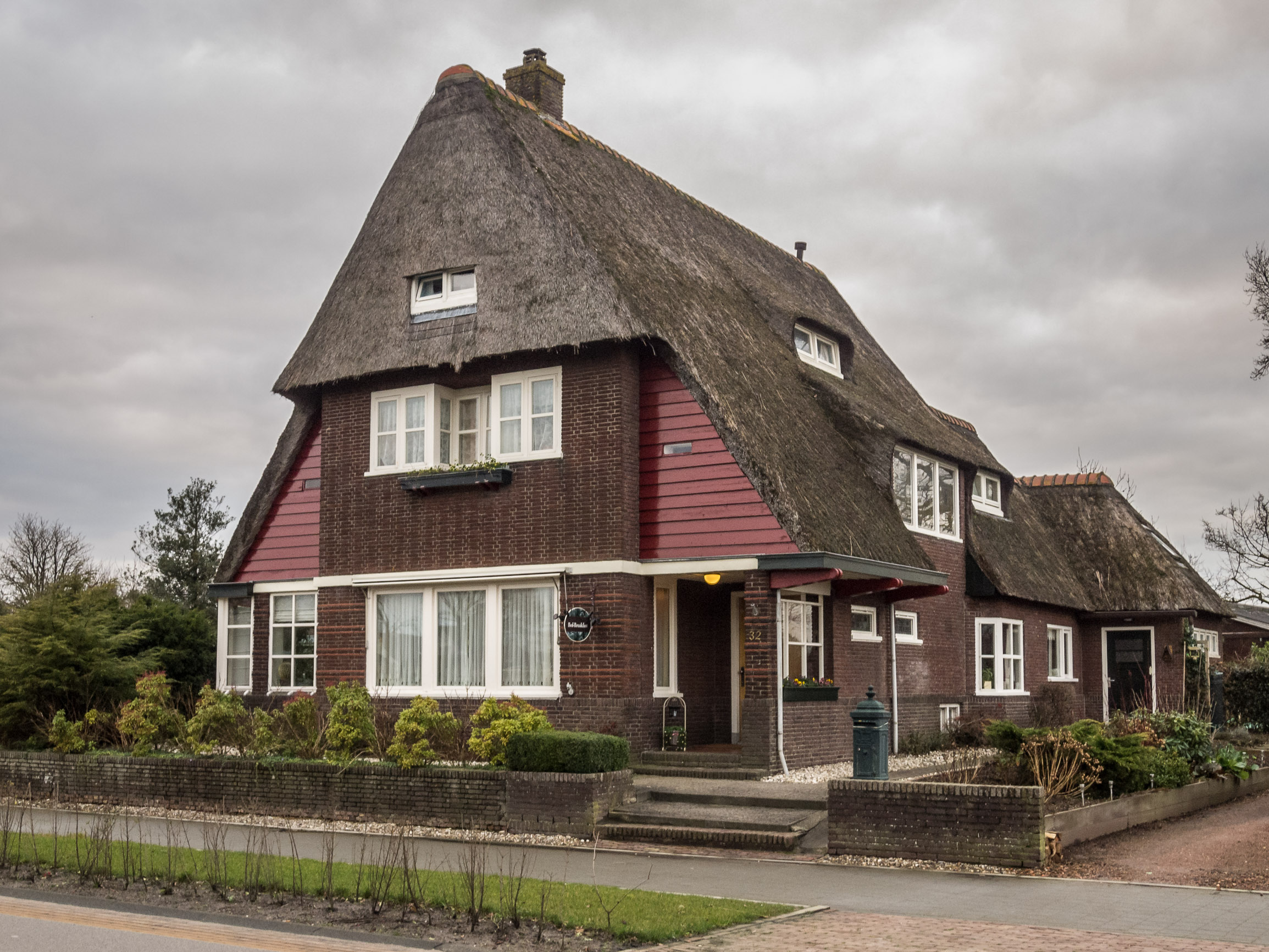 Kommisjewei 32, Opeinde Villa in de stijl van de Amsterdamse School